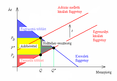 Adó hatása